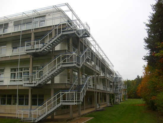 Gebäude des Klinikum Süd im Oktober 2010